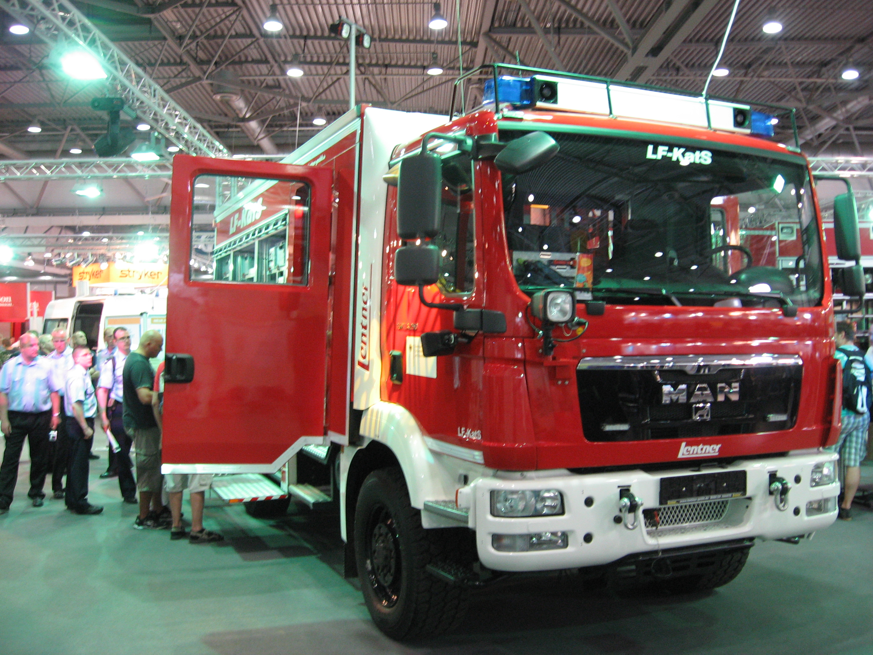 Löschgruppenfahrzeug des Katastrophenschutzes (LF KatS) auf der Interschutz 2010